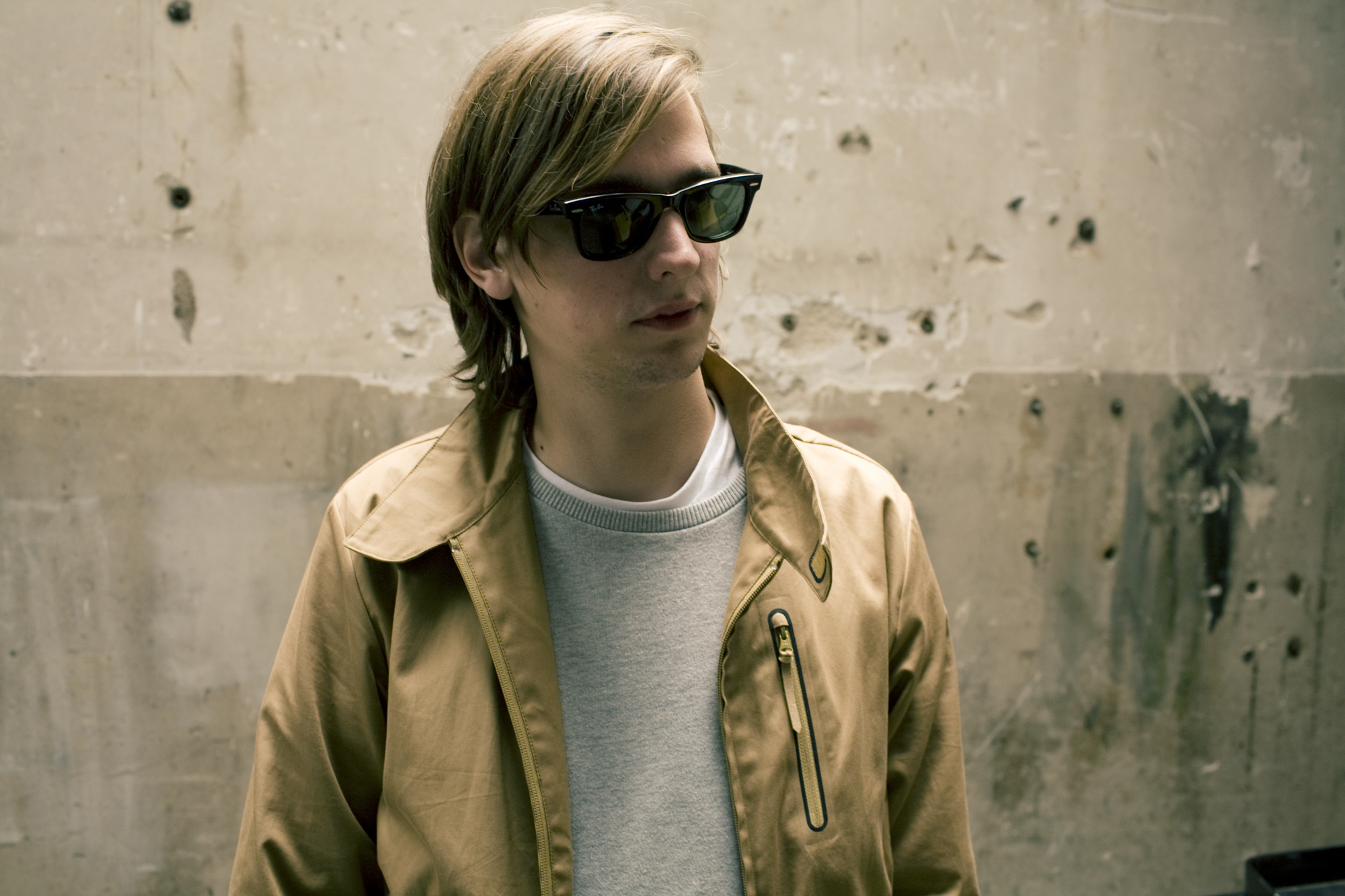 Nederlands muzikant Faberyayo